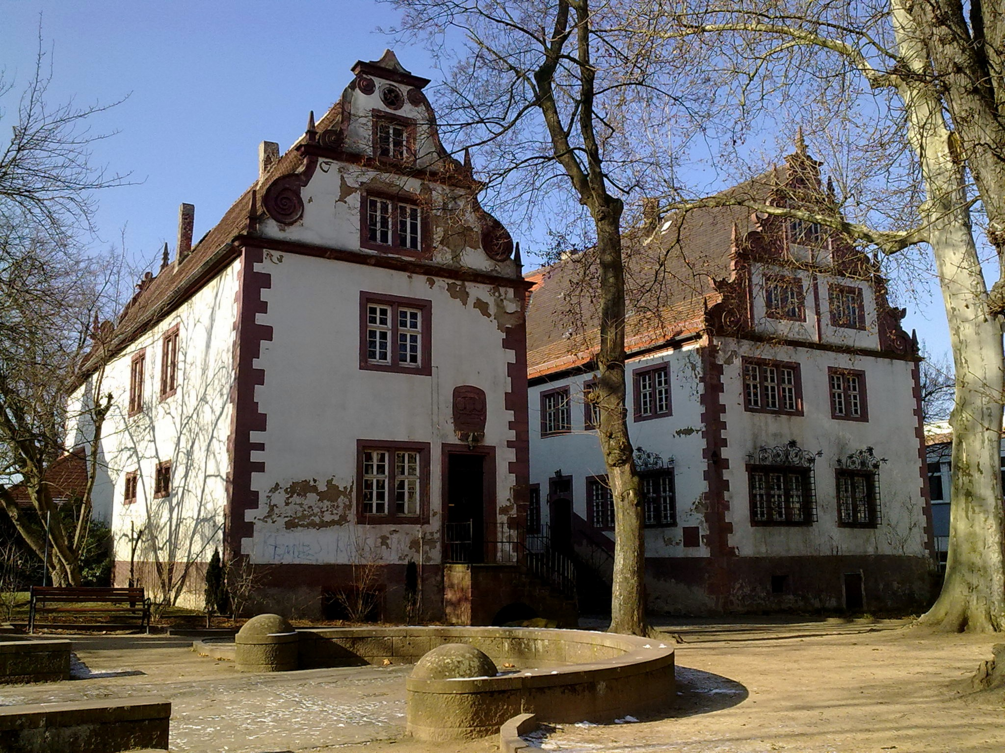 Das Wambolt'sche Schloss in Groß-Umstadt, Aufnahme Richtung Nordwesten; über dem Aufgang des Südbaues ist die Wappentafel, an der Südostecke des Nordbaues die Infotafel erkennbar; die östlichen Fenster des Nordbaues zeigen die schönen Schmiedearbeiten